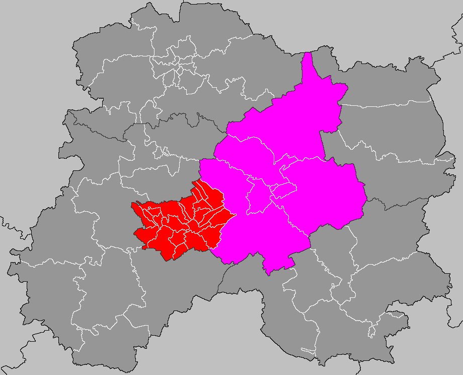 Localisation du canton de Vertus